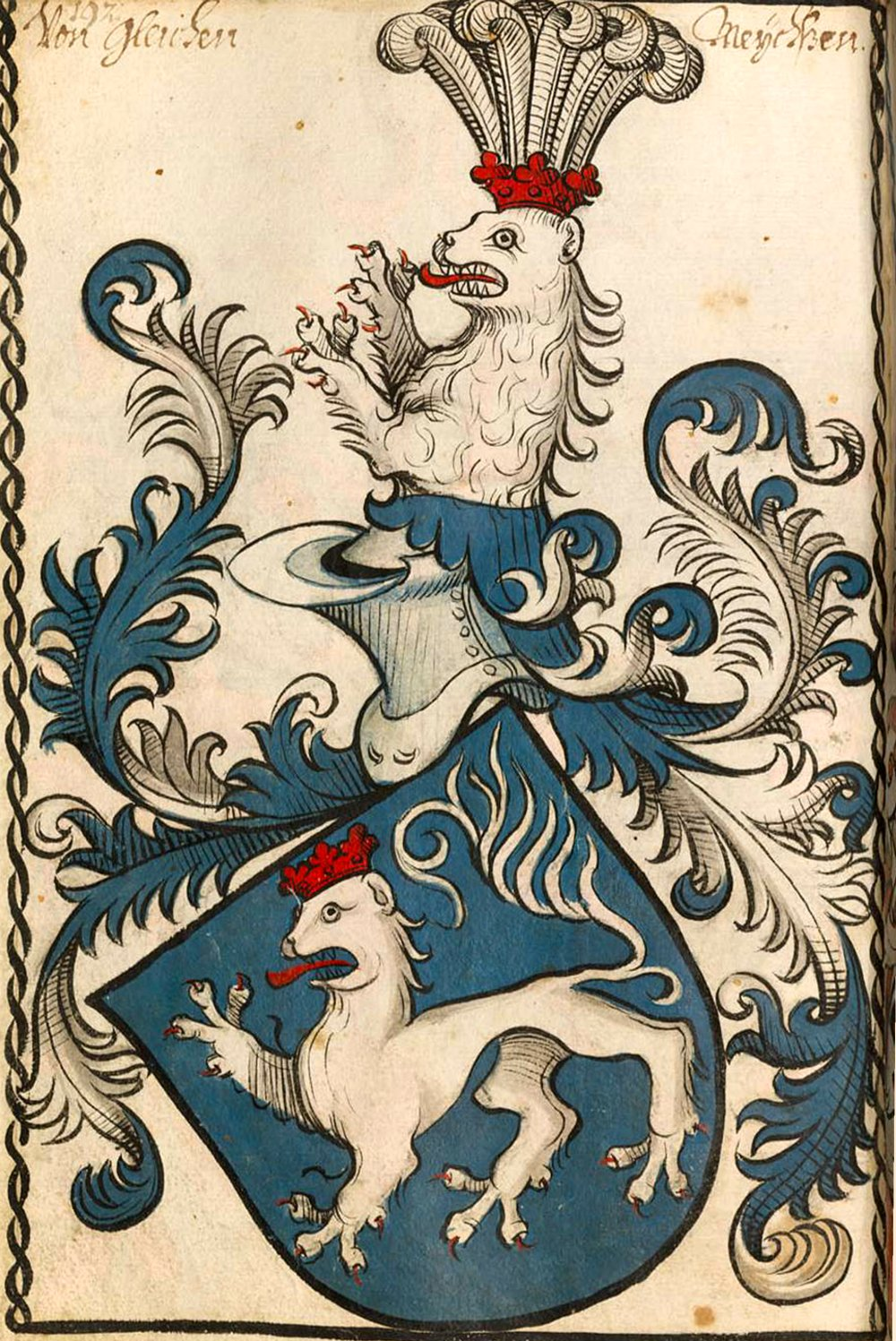 Scheibler'sches Wappenbuch , älterer Teil Meißner Gleichen